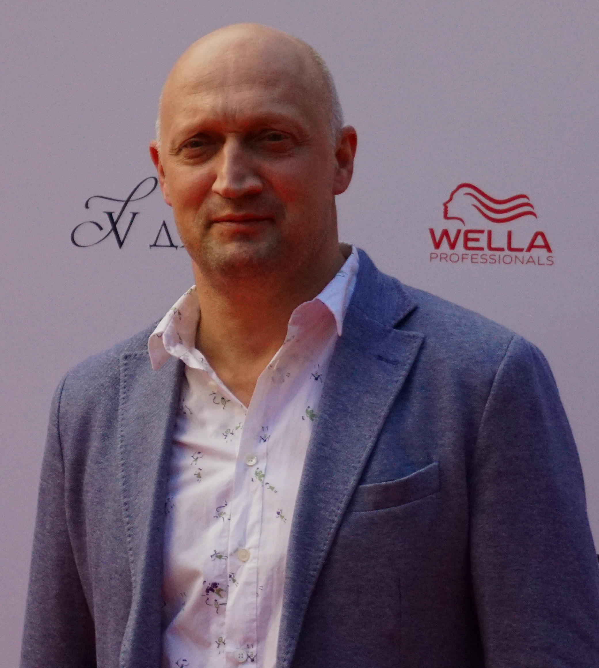 Гоша Куце́нко (настоящее имя — Ю́рий Гео́ргиевич Куце́нко; род. 20 мая 1967, Запорожье, Украинская ССР, СССР) — известный советский и российский актёр театра и кино, кинорежиссёр, певец, сценарист и продюсер. Заслуженный артист России на Кинотавре в Сочи, 2016.